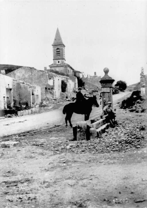 Marbotte (Meuse) (commune d'Apremont-la-Forêt)